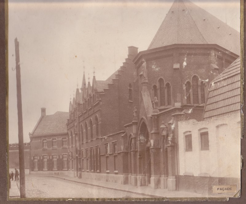 gevel Benediktinessenstraat